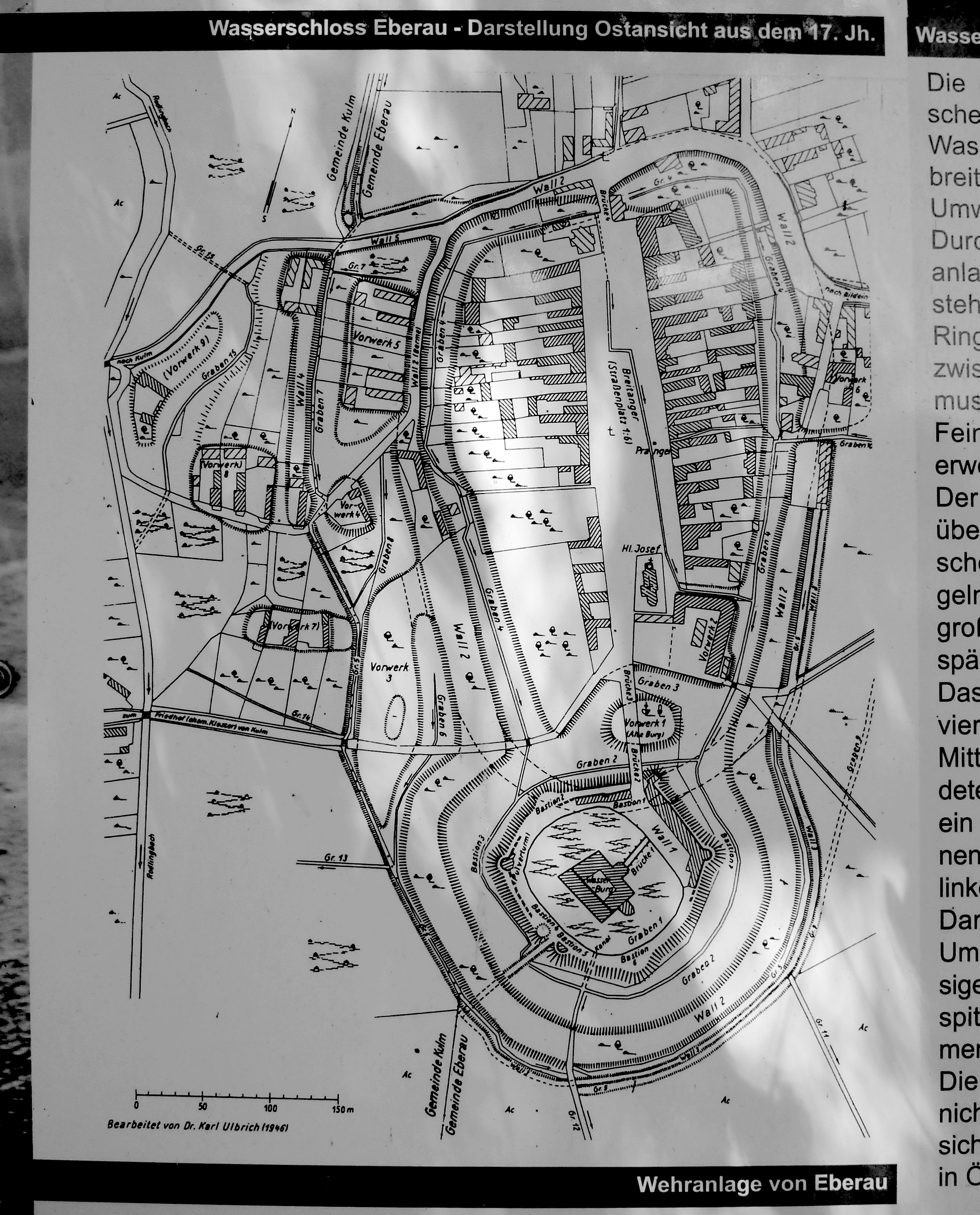 Schloss und Wehranlage Eberau. Informationstafel mit Beschreibung, Plan und alter Ansicht an der Außenmauer der Anlage.